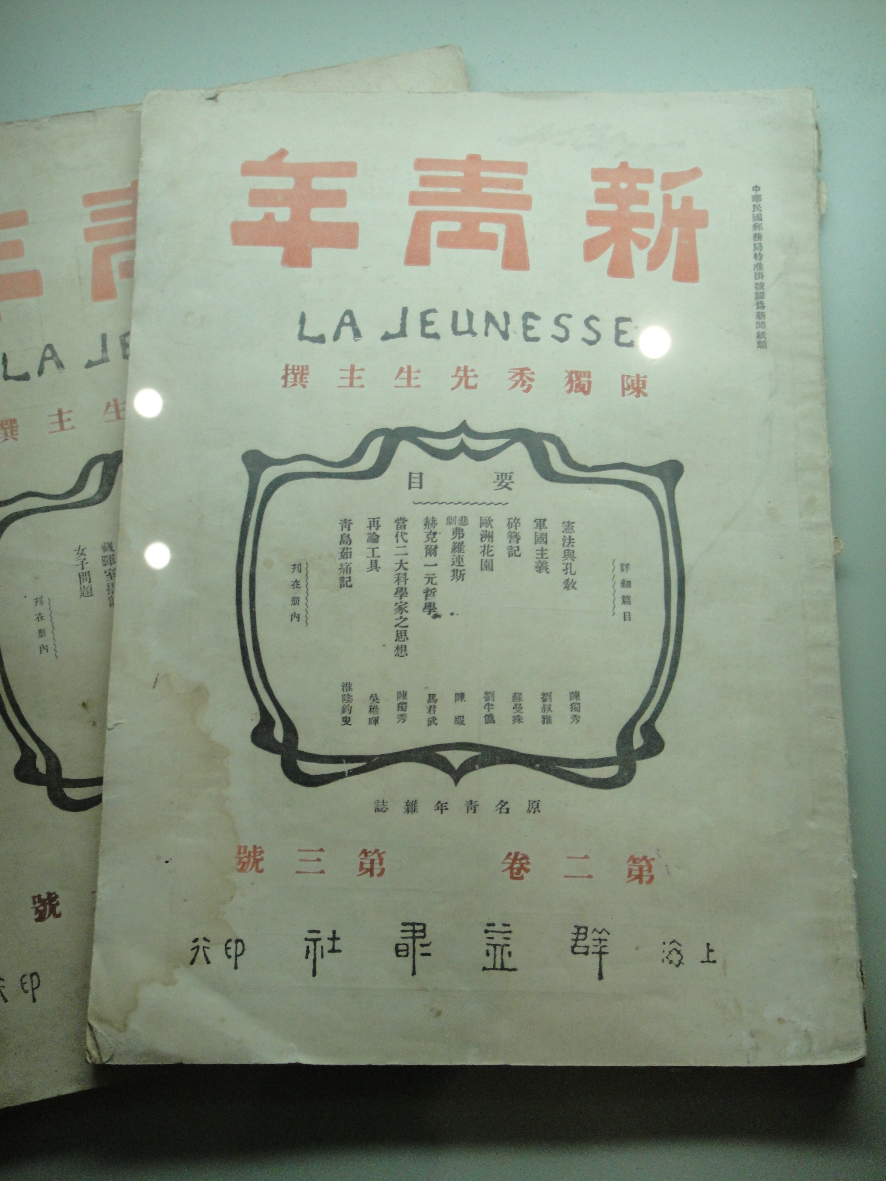 中文（中国大陆）: 新青年]》杂志的封面，藏于[:zh:浙江省博物馆